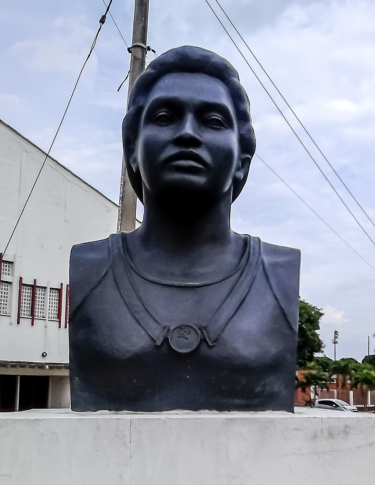 Busto de María Isabel Urrutia en la Unidad Deportiva Panamericana Esta fotografía fue tomada en el municipio colombiano con código 76001.